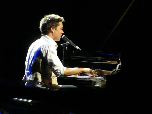 Rufus Wainwright en un concierto en Madrid en mayo de 2010.